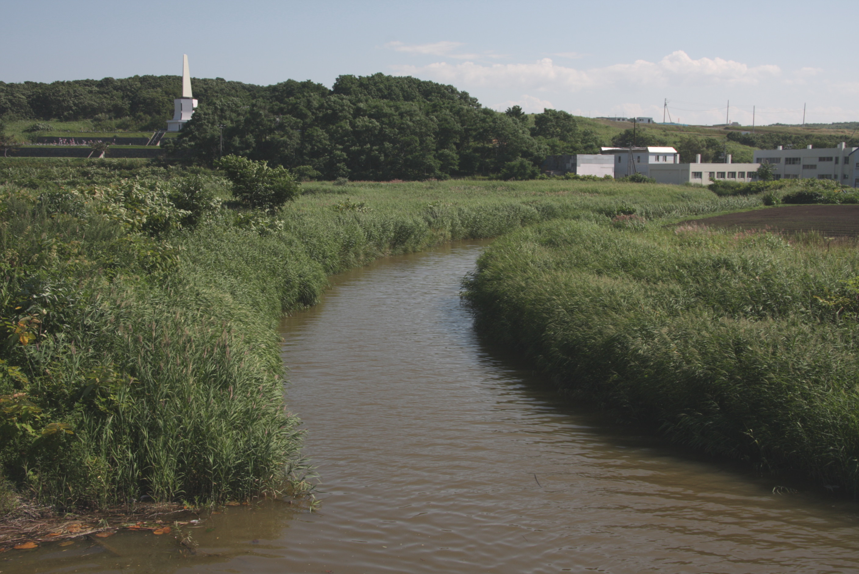 望来川（石狩市厚田区） 望来獅子橋より上流を望む